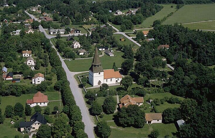 Motiv: Alva kyrka Nyckelord: Flygbilder, Riksintressen Kategori: KyrkbyAlva kyrka